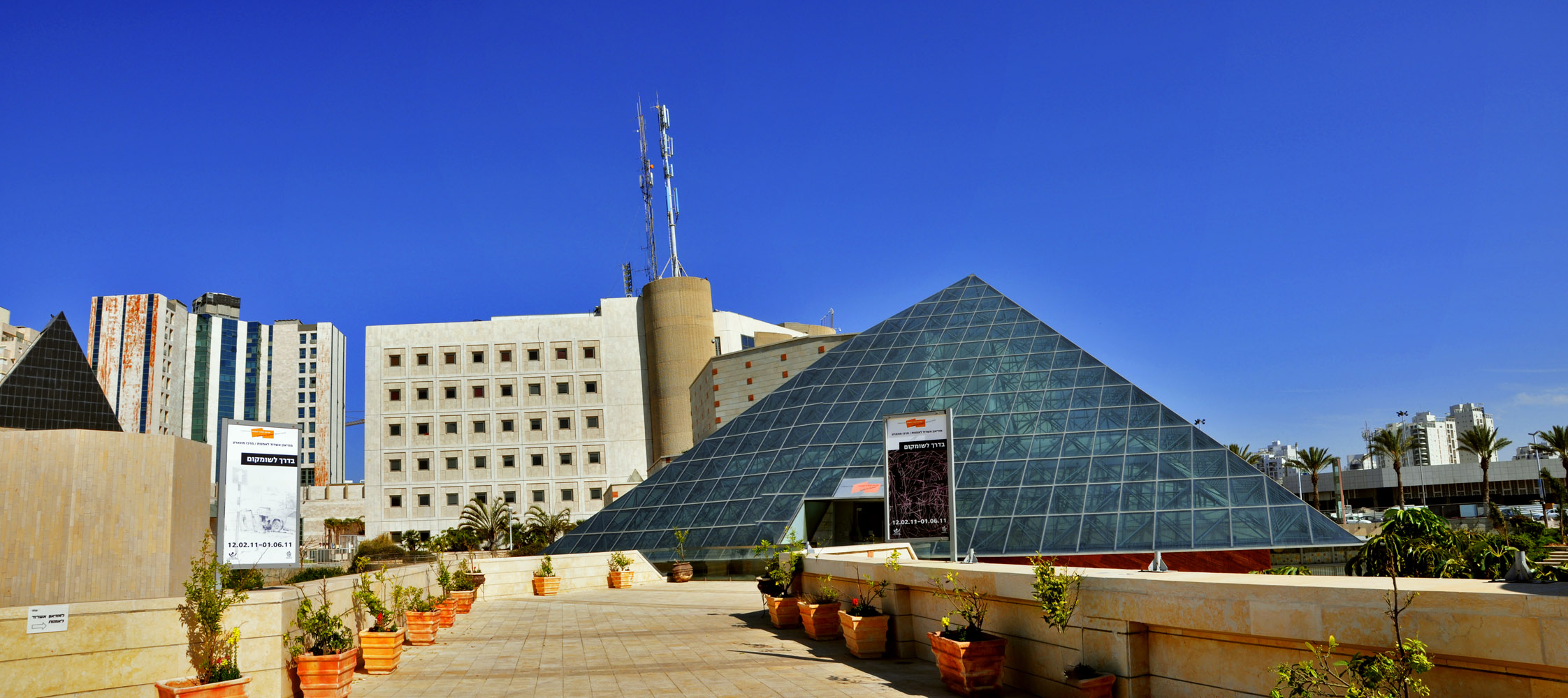 Museum & Arts Center, Ashdod